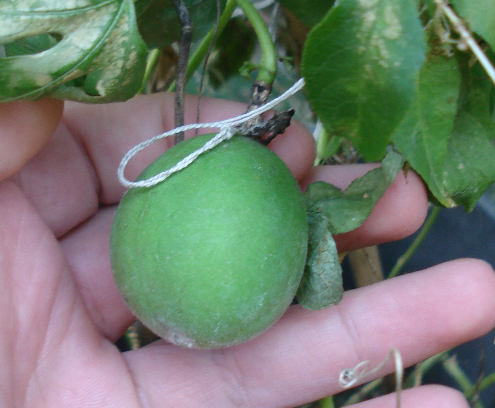 frutto di passiflora incarnata, allegato su pianta da seme di 6 mesi